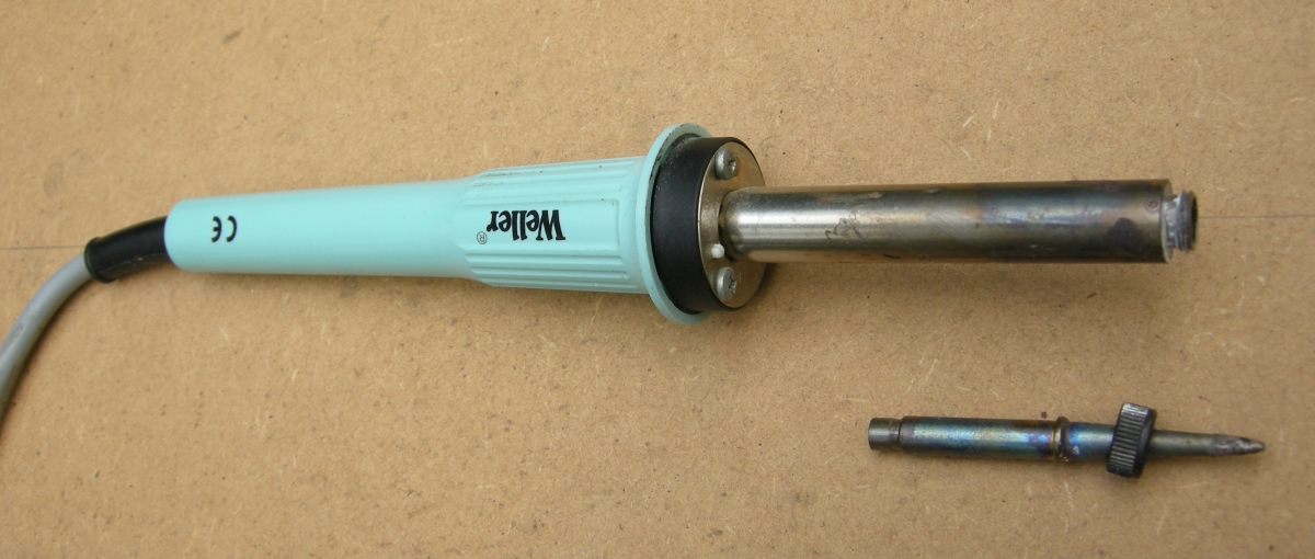 Een magnetostatische soldeerbout van Weller